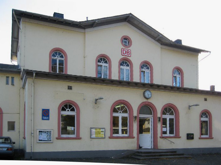 Bahnhof Nassau an der Lahn, Rheinland-Pfalz, Deutschland. Stationsgebäude 1860 errichtet nach Plänen des Architekten Heinrich Velde.